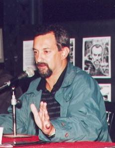 Eduardo Risso en Leyendas